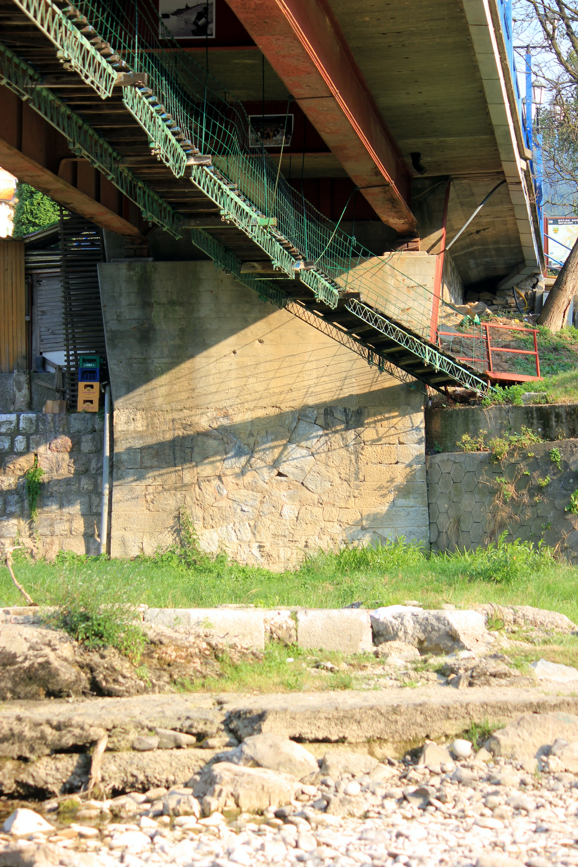 Hängebrücke aus der Zeit des Bosnienkrieges unter der Alija-Izetbegović-Brücke in Goražde, Bosnien und Herzegowina.